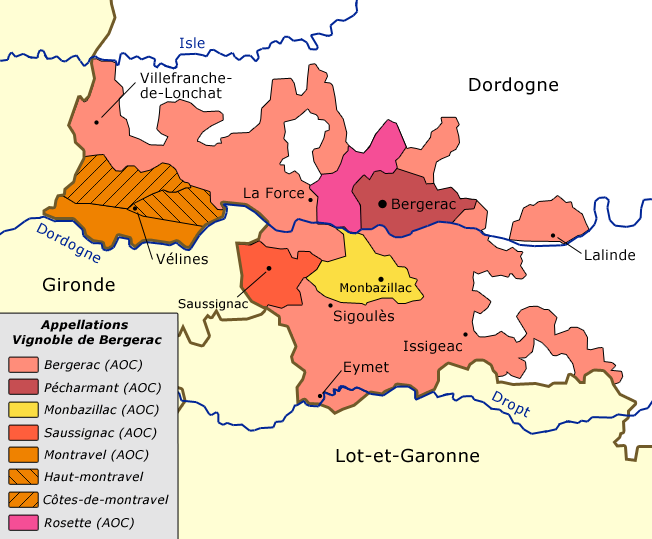 Carte des appellations AOC Bergerac